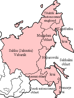 Kaug-Ida föderaalringkonna haldusjaotus